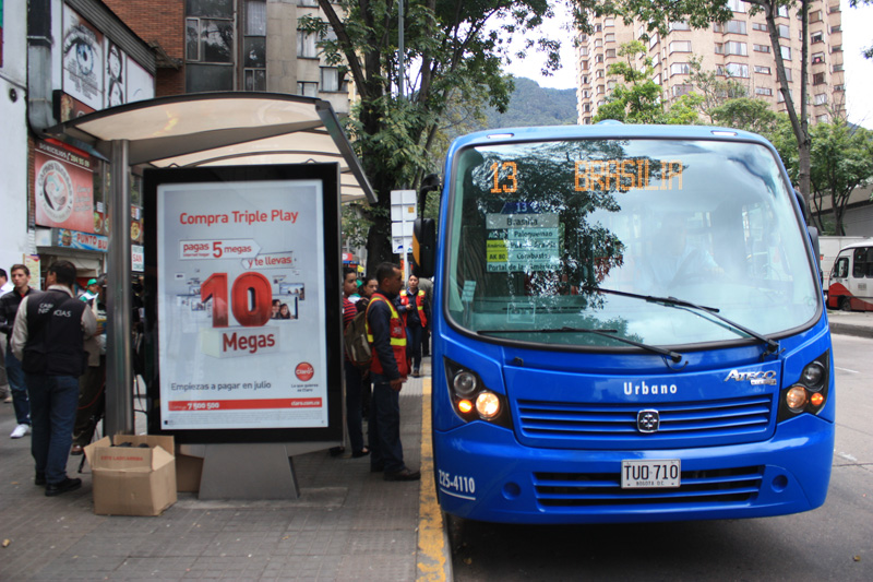 Paradero y bus urbano en Bogotá.